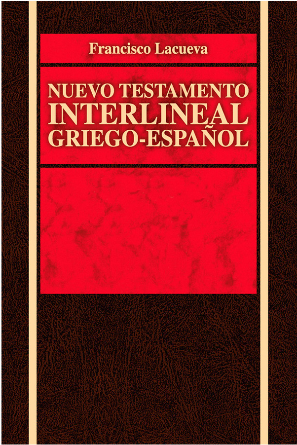 Nuevo Testamento interlineal griego-español: con el texto griego de Nestle